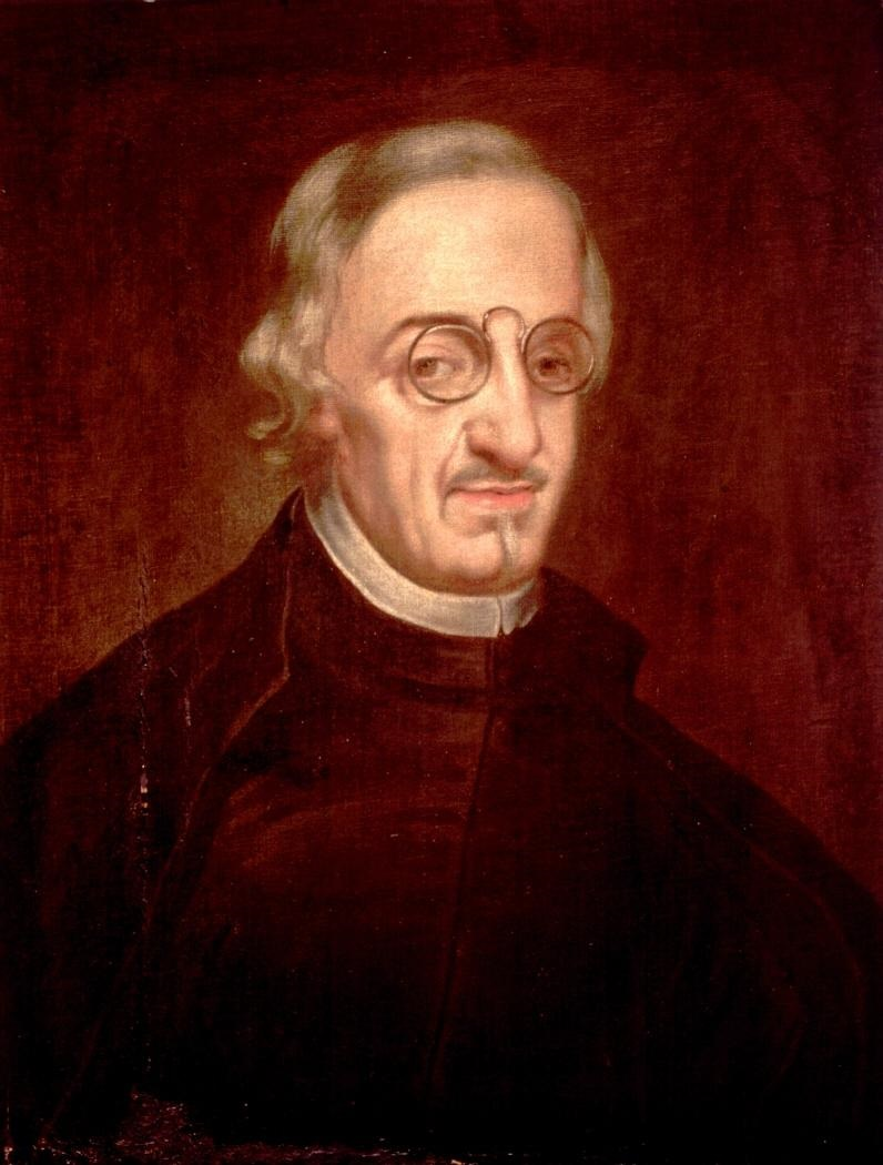 Retrato del escritor español Antonio de Solís y Rivadeneyra (1610-1686), atribuido tradicionalmente a Juan de Alfaro y últimamente a Tomás de Aguiar, a quien Solís dedicó un soneto en gratitud por el retrato que le había pintado.